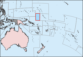 Karte Ozeaniens, Nauru hervorgehoben